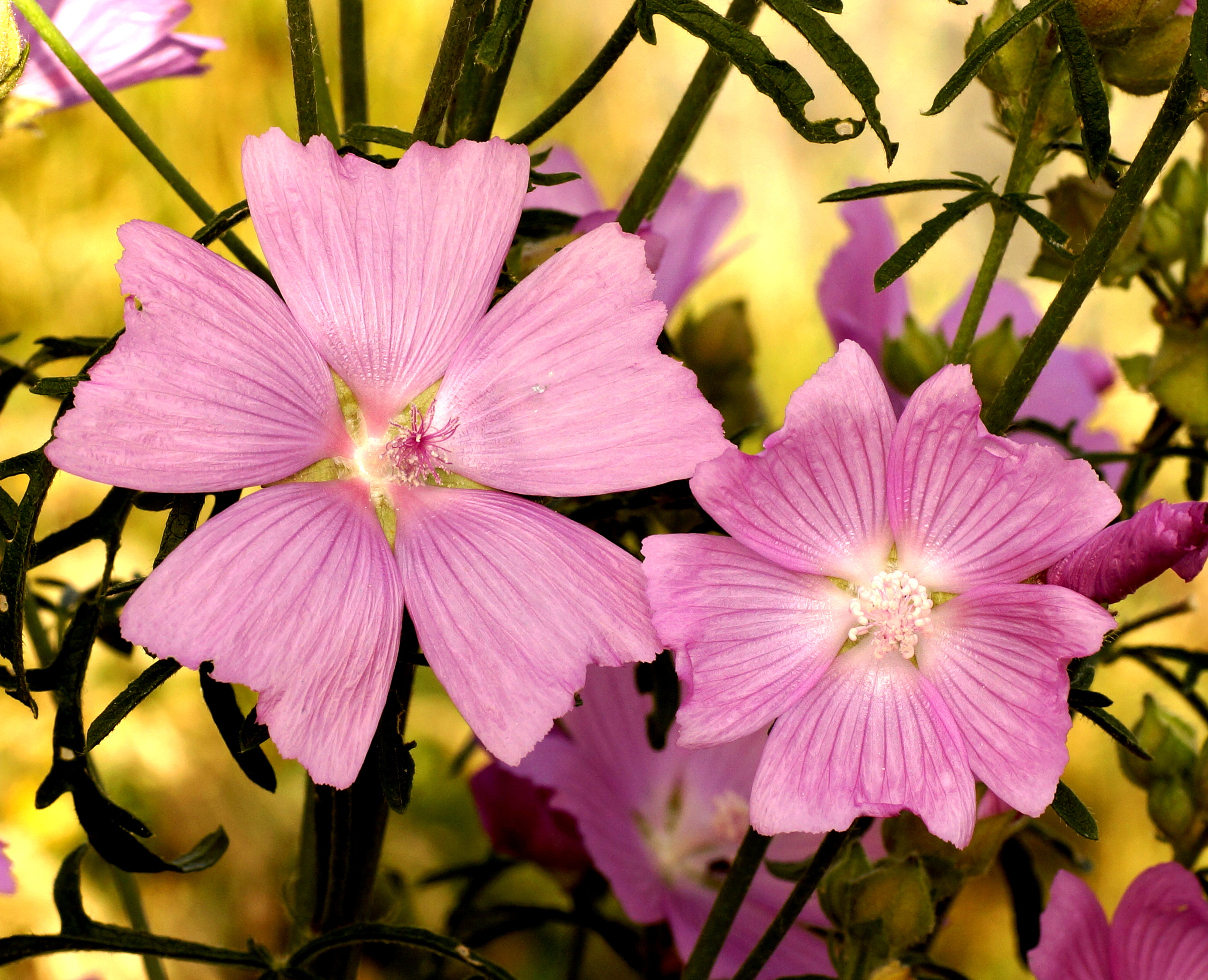 Moschus-Malve, Malvaceae, Deutschland, Bayern, Oberfranken, Selbitz Photo: U.Schmidt, 20.VIII.2012